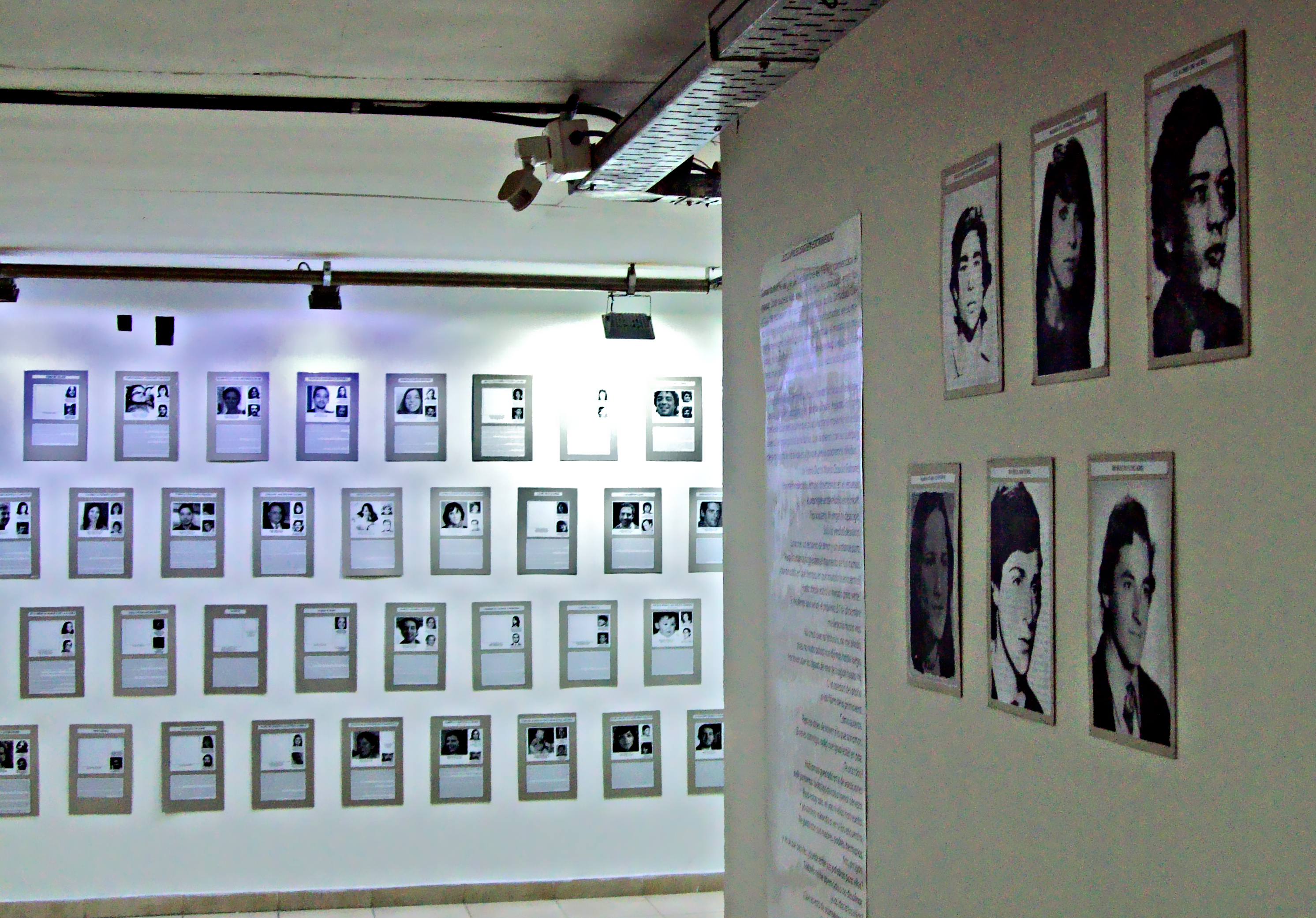 Pasillo de la memoria en homenaje a los neonatos secuestrados durante la dictadura cívico militar que gobernó a la Argentina durante 1976 a 1983, en la Universidad Tecnológica Nacional (UTN) Facultad Regional de Avellaneda, Villa Dominico, Argentina.